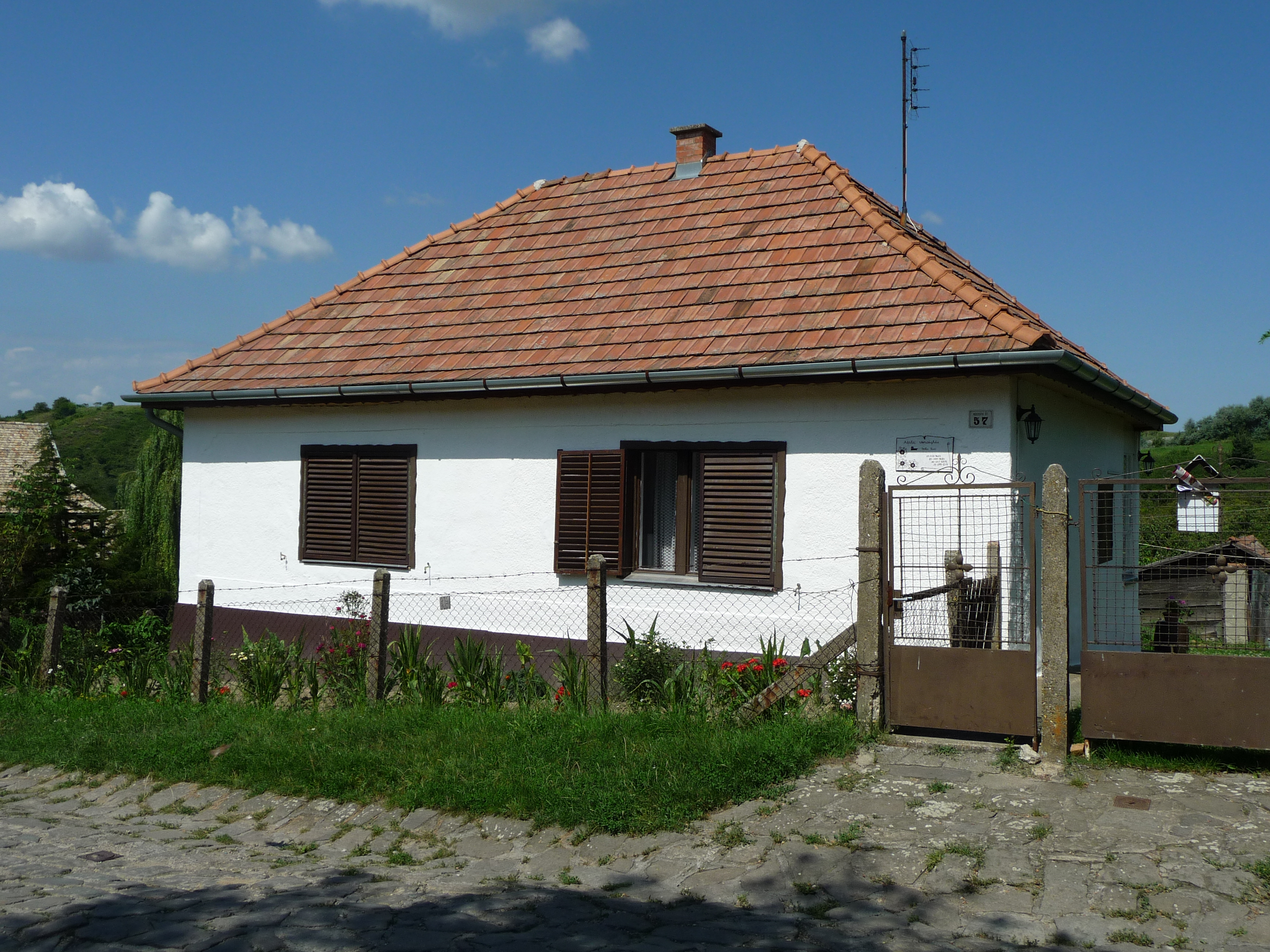 Hollókő, Kossuth L. út 57.